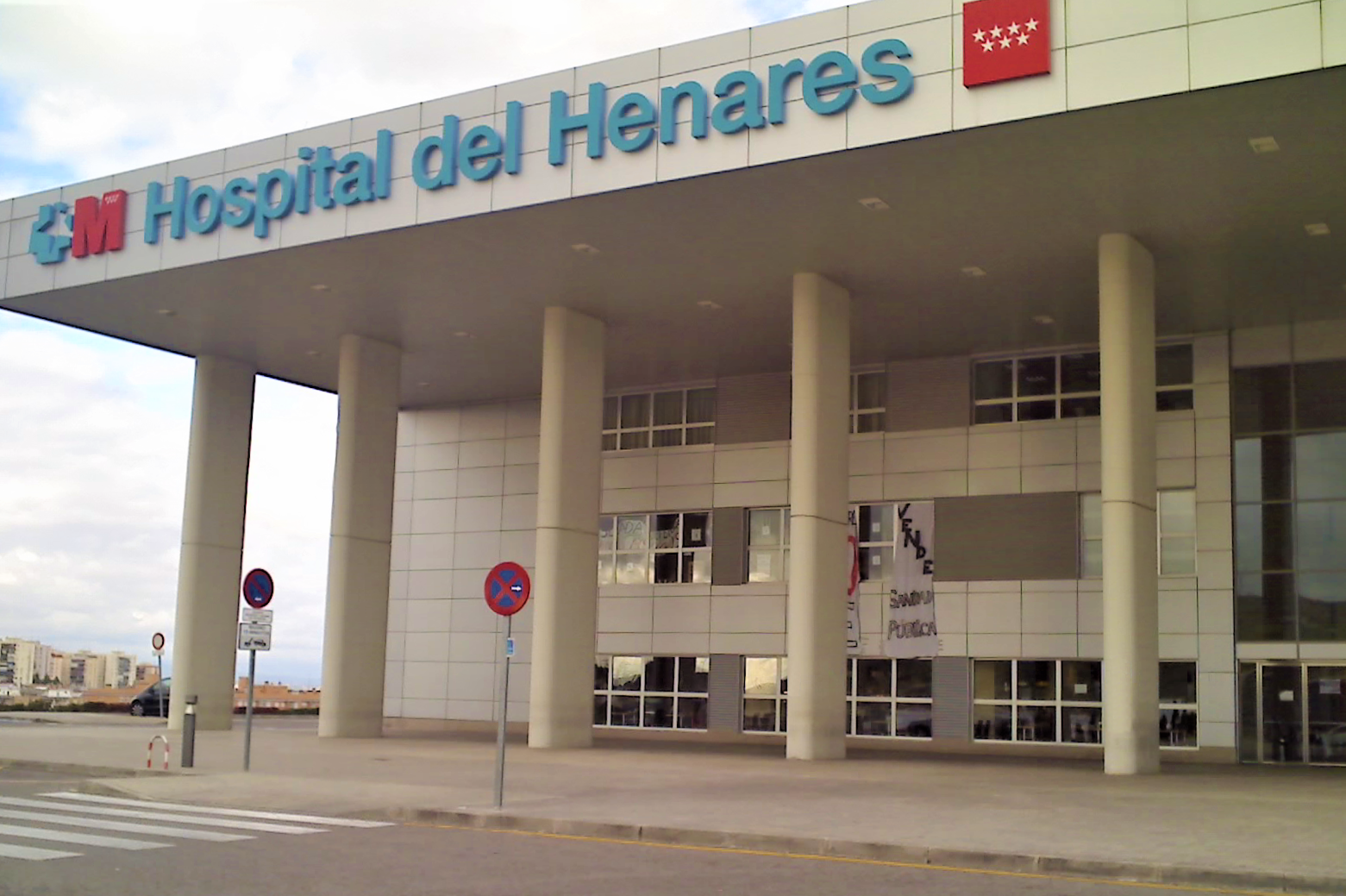 Entrada principal del Hospital del Henares en Coslada (Comunidad de Madrid - España) inaugurado el 8 de febrero de 2008.